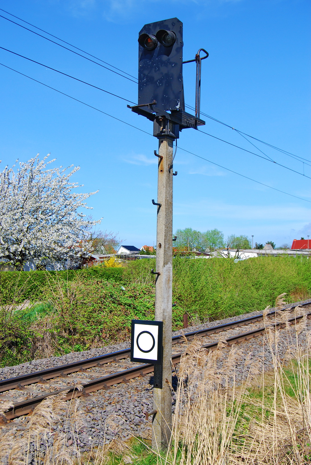 Hl-Vorsignalwiederholer (zeigt Signalbegriff Hl 10 »Halt erwarten«)